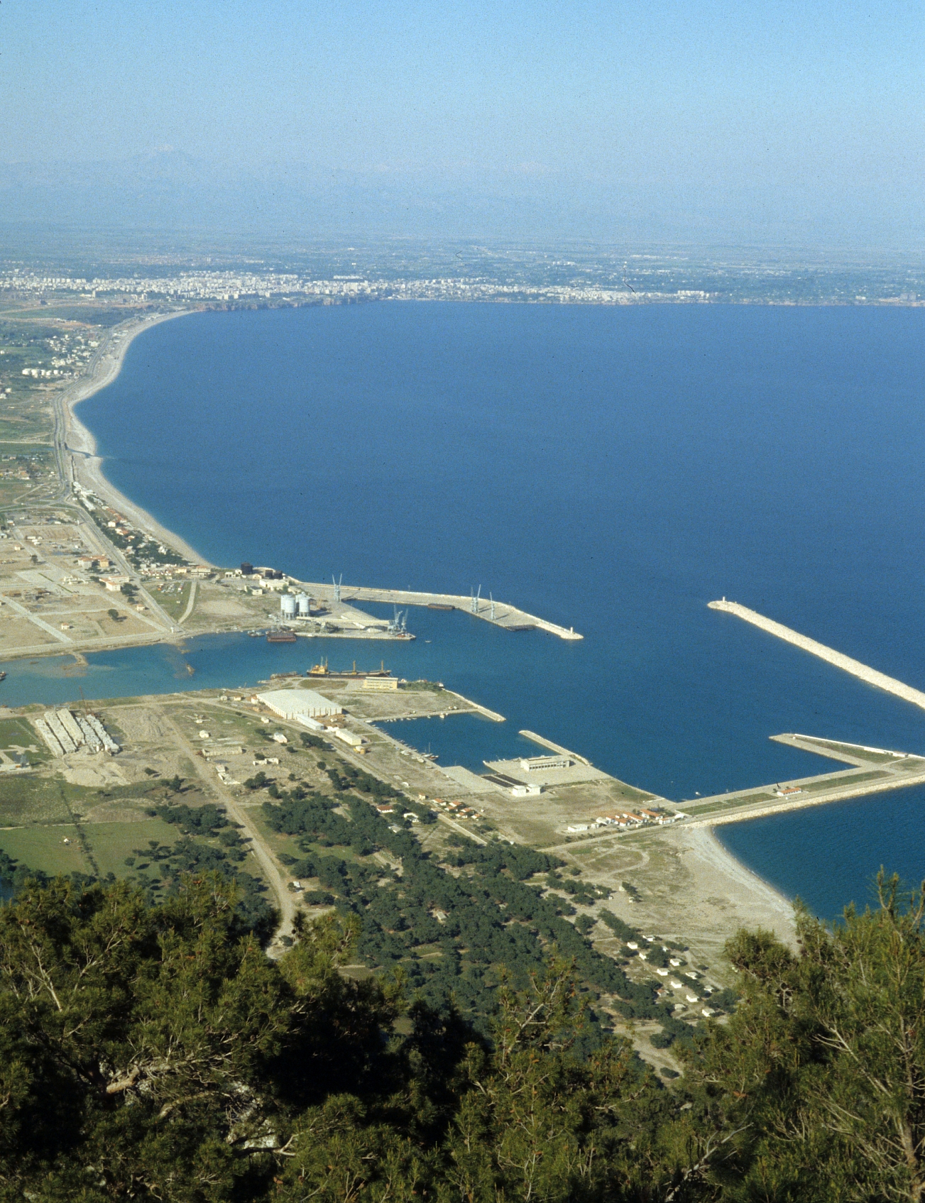 Blick auf Antalya (Südtürkei) vom Tünektepe